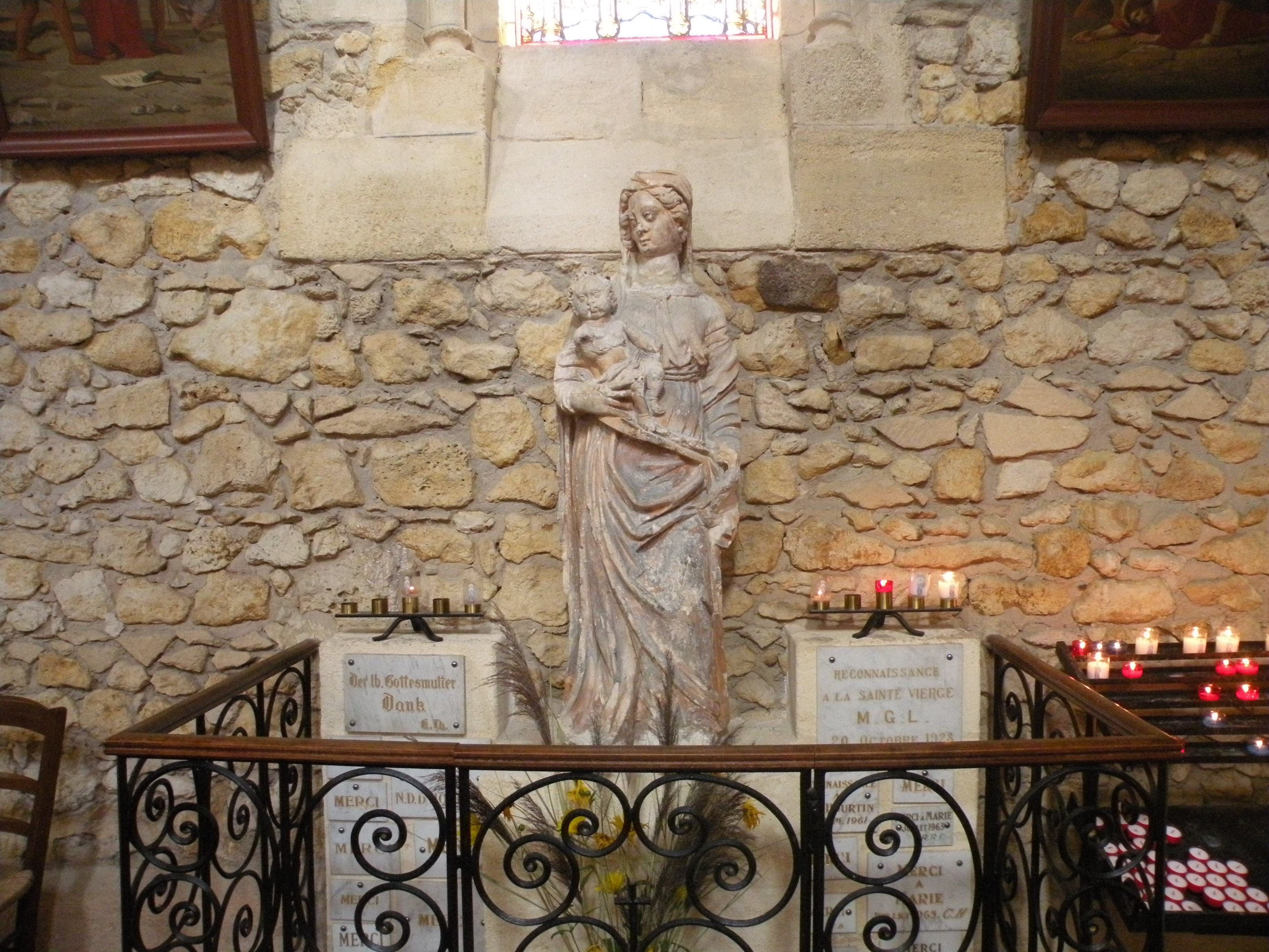 Église Sainte-Hélène de Hourtin